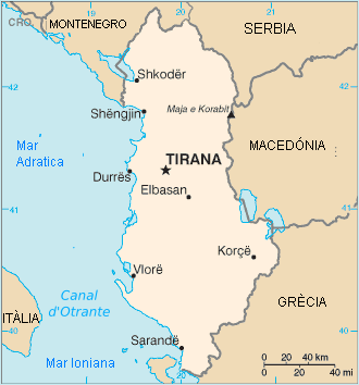 Traduch dempuèi un document Commons liure de drech per Cedric31 23 de nov de 2006 a 14:50 (UTC)